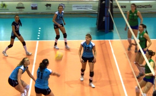 игра чемпионата Азербайджана по волейболу среди женских команд. Игтисадчи - Рабита